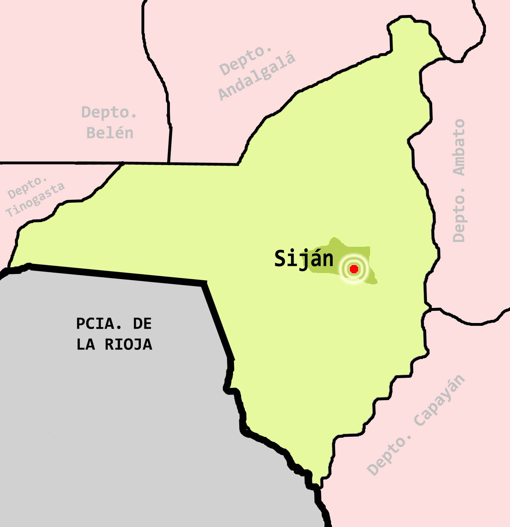 Territorio de Siján, Depto. Pomán, Pcia. de Catamarca, Argentina.